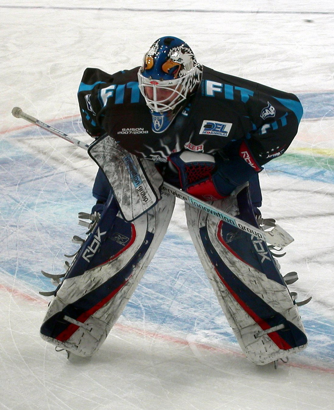 Adam Hauser, Adler Mannheim